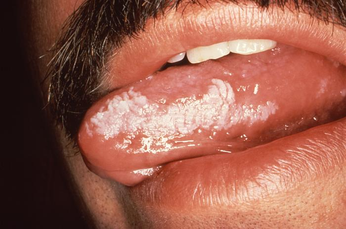 Leukoplasia mihiaren alboan